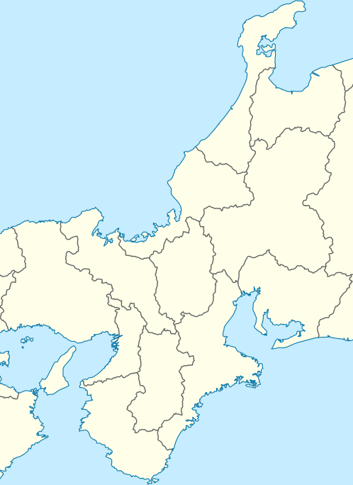 日本の東海地方・北陸地方・近畿地方（関西地方）